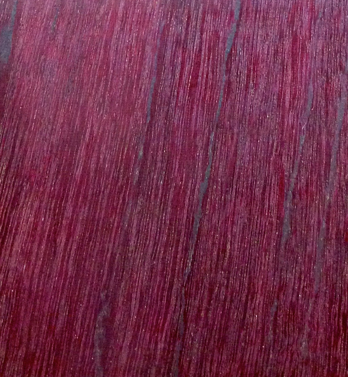 Amaranth 2